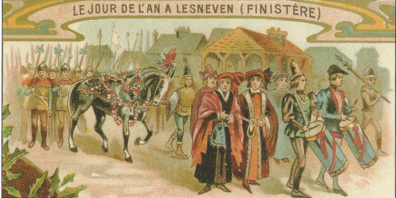 Le nouvel an à Lesneven (chromo du chocolat Guérin-Boutron, collection "Traditions et costumes", vers 1900). A l'occasion du Nouvel An, les échevins de la ville promenaient en grande pompe un boeuf ou un cheval couvert de fleurs. Des quêteurs étaient chargés de recueillir les offrandes qui étaient distribuées aux indigents.